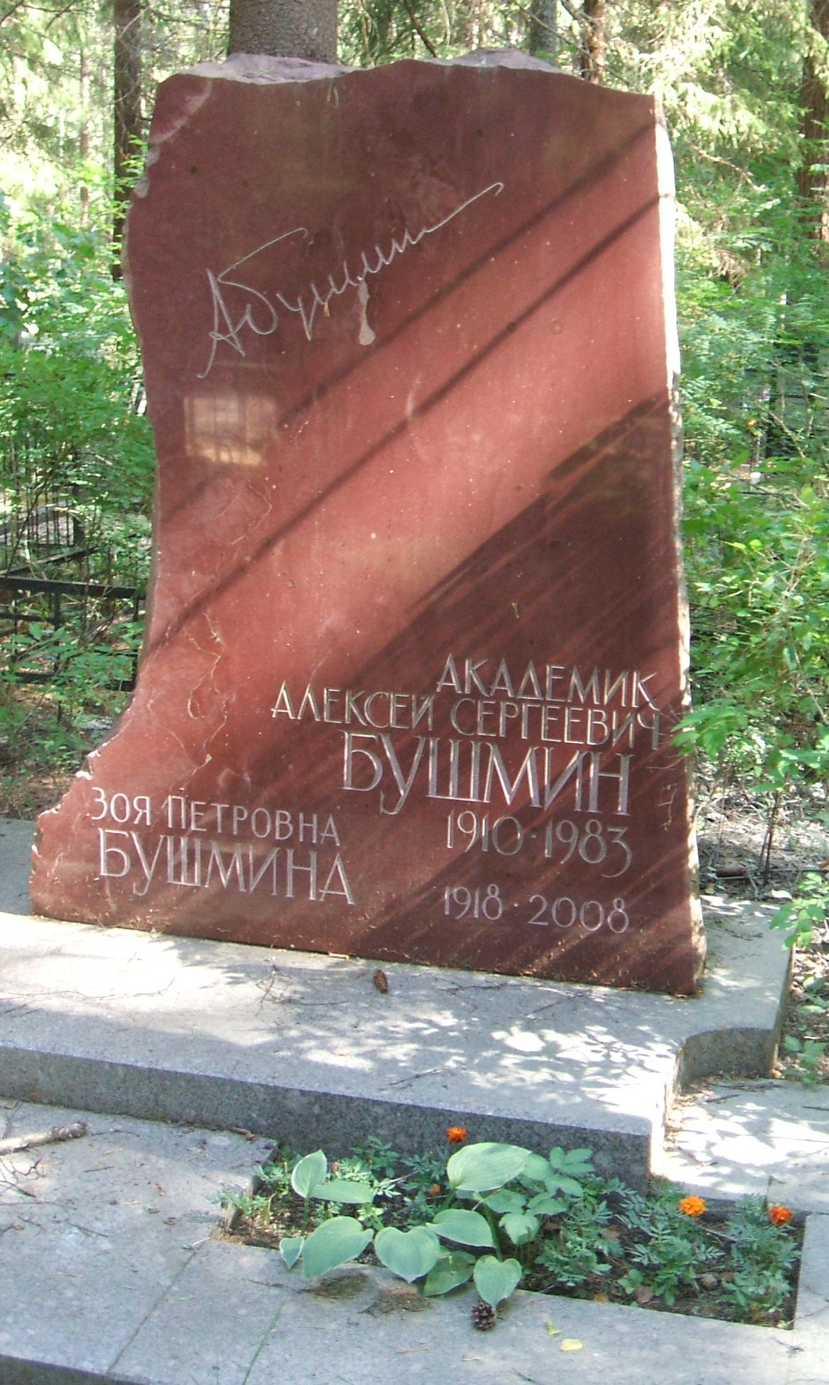 Комаровское кладбище Деятели культуры и науки